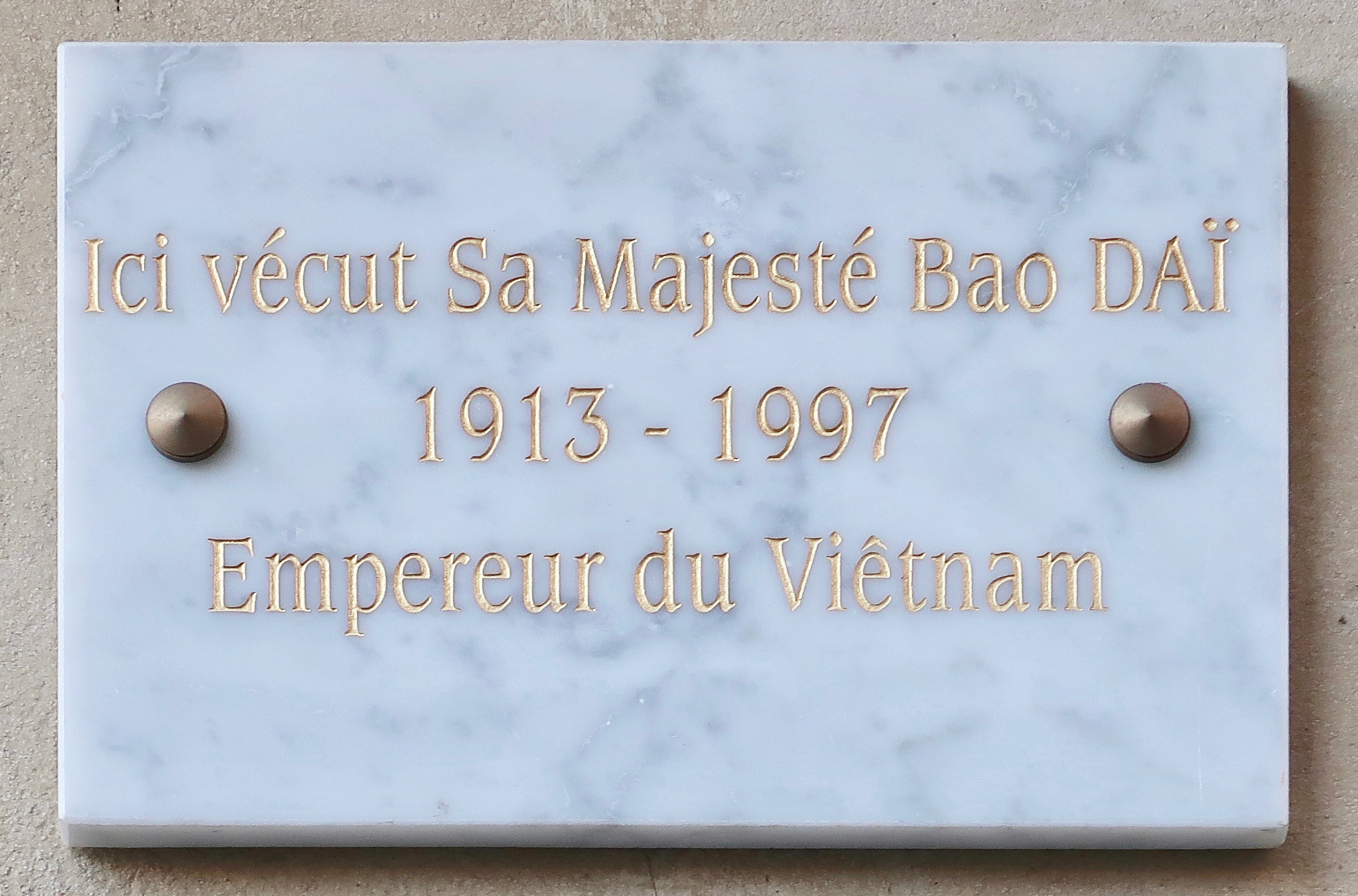 Plaque en hommage à Bao Daï, 13 avenue de Lamballe (Paris, 16e).